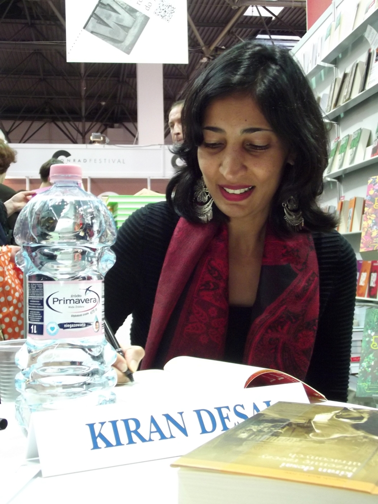 Kiran Desai podczas 17. Targów Książki w Krakowie.